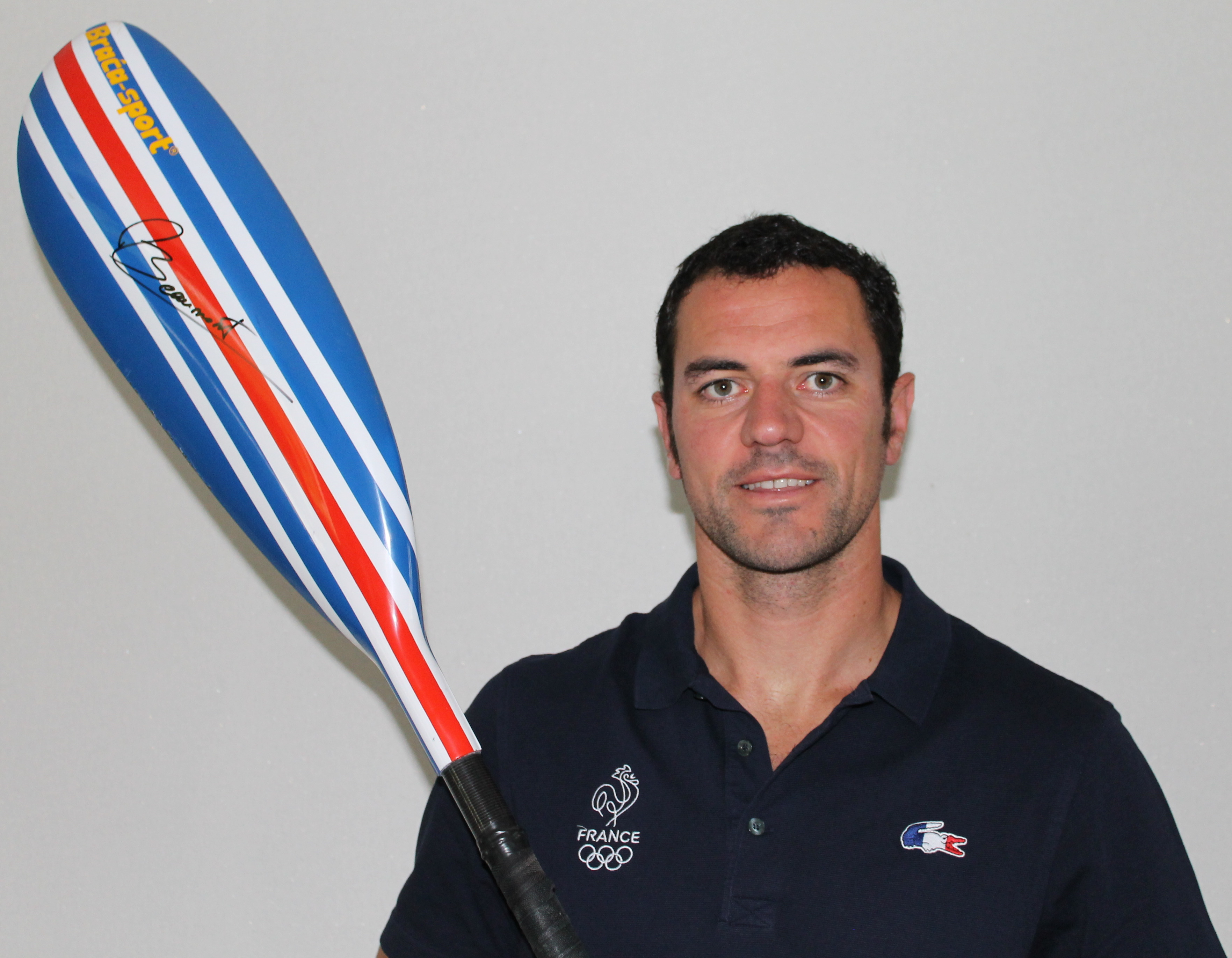 portrait